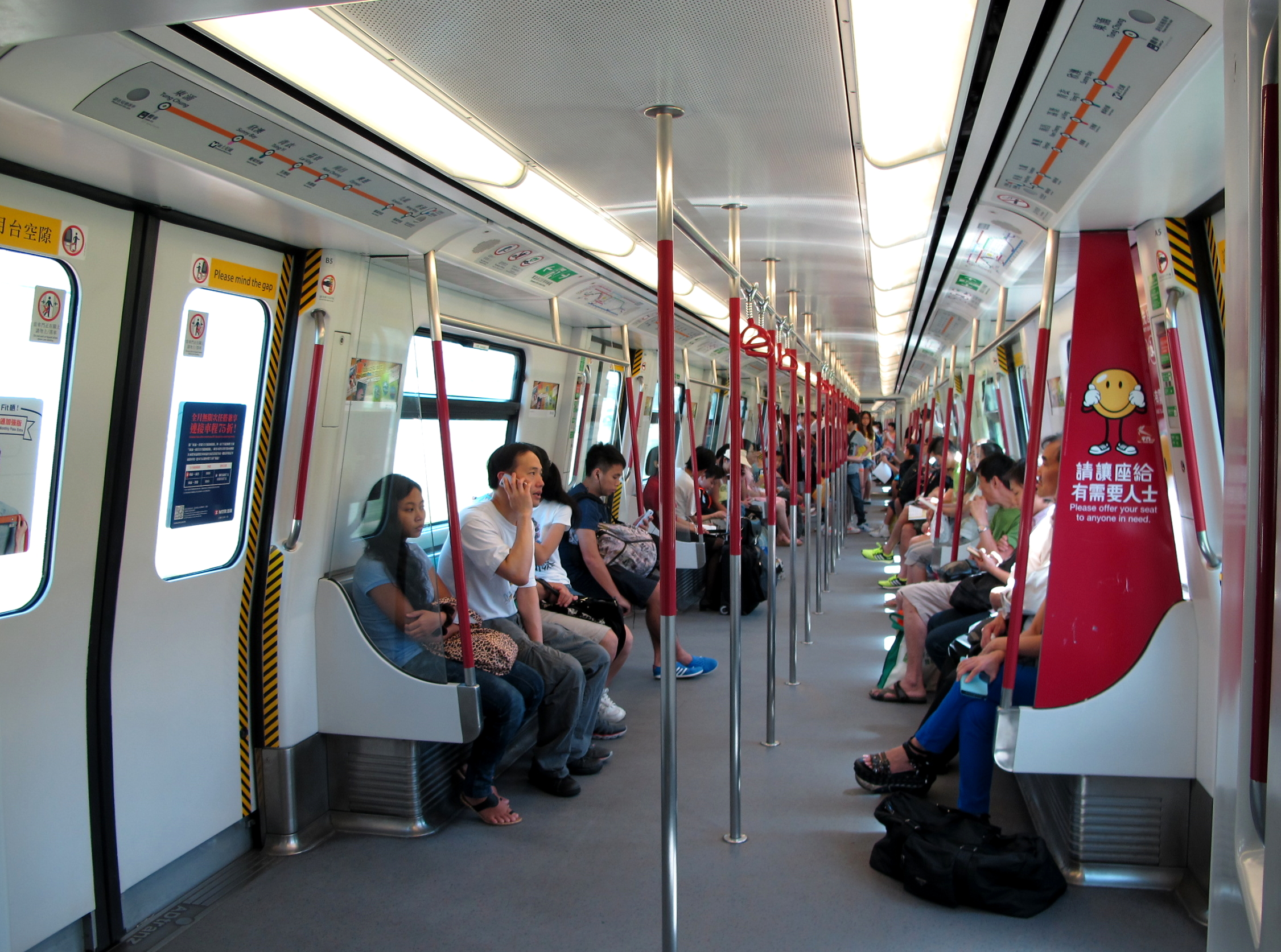 港鐵Adtranz-CAF電動列車